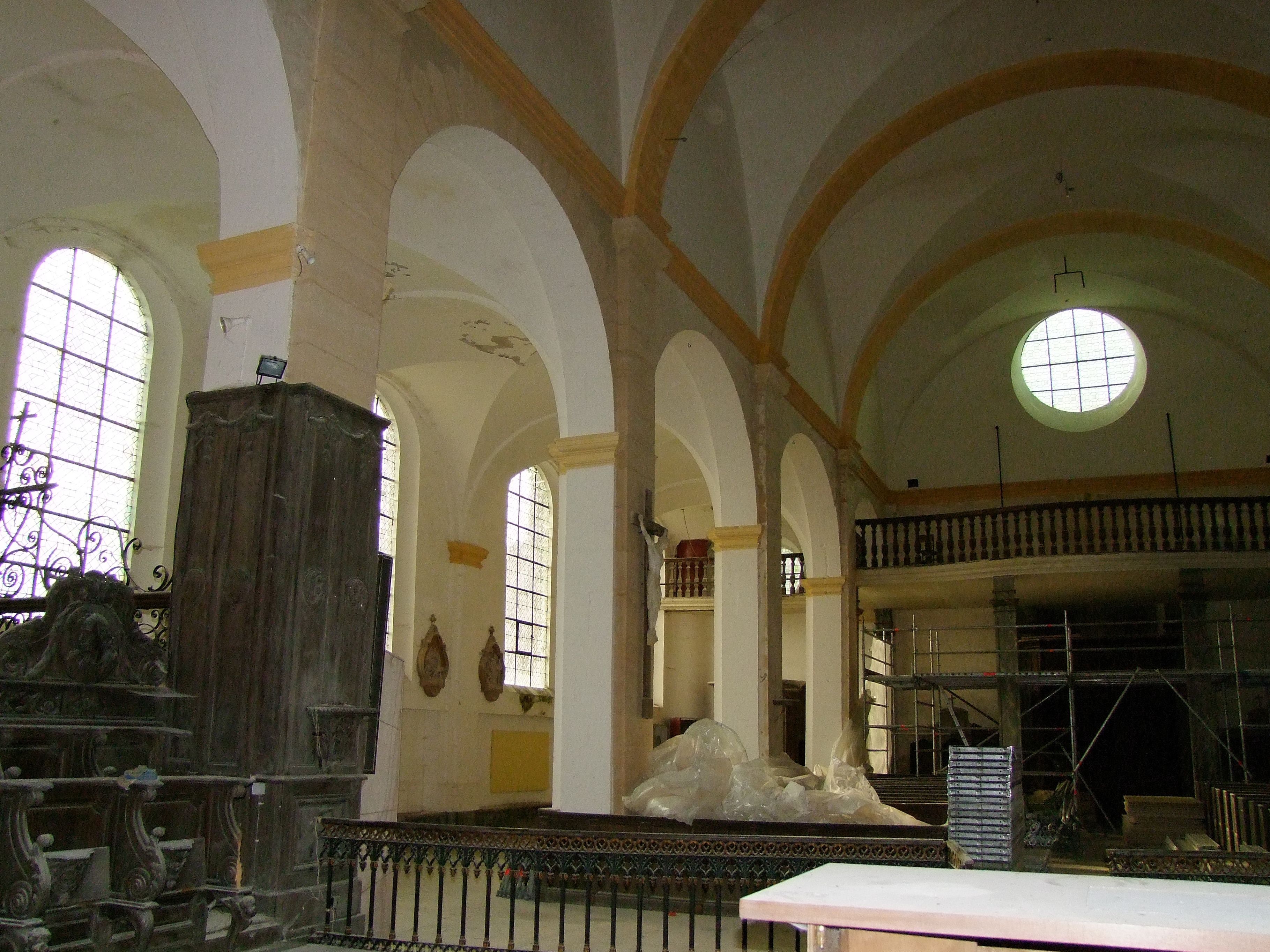 Vaisseau principal et jubé de Saint-Martin, Montmédy, Meuse, France